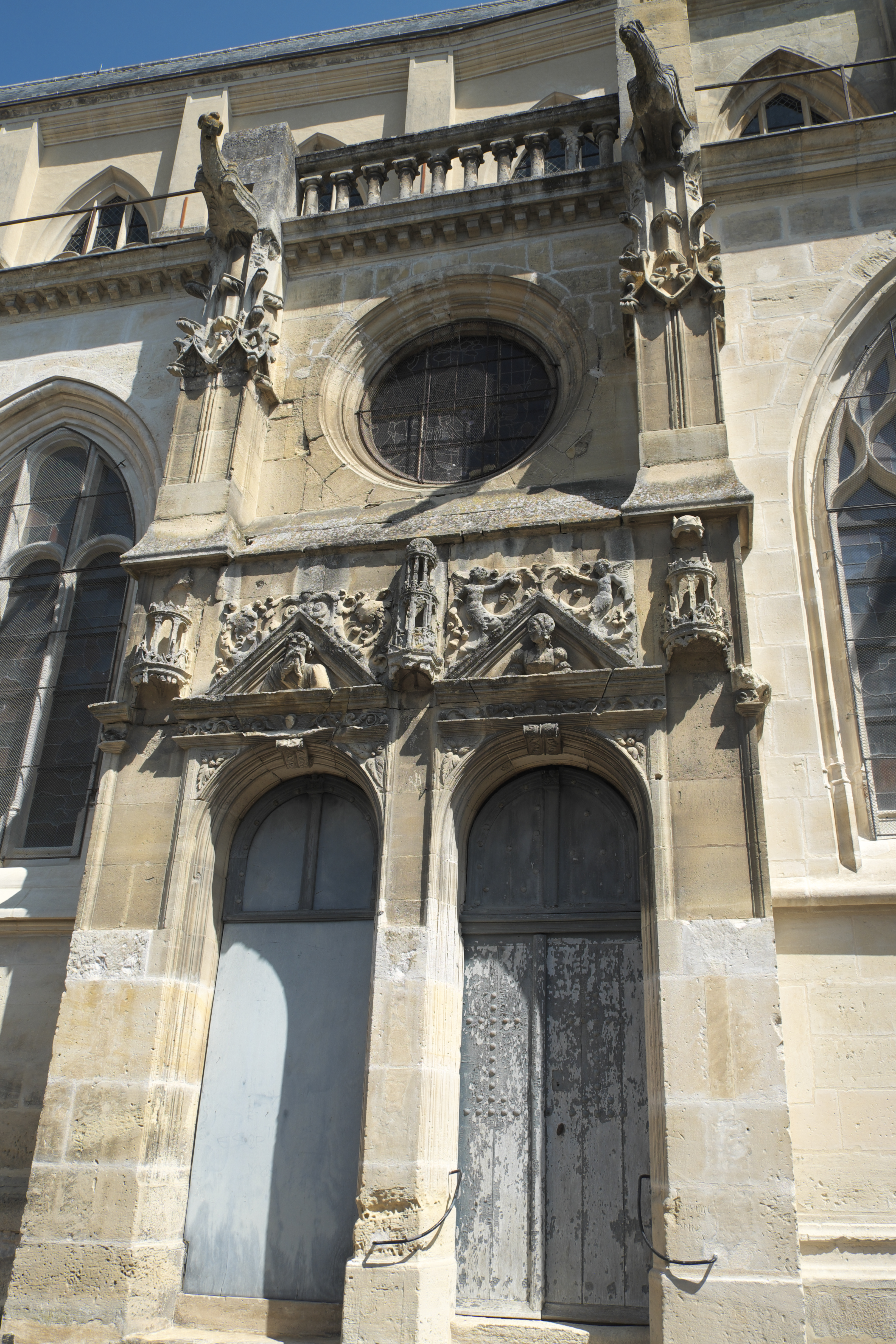 Katholische Pfarrkirche Saint-Pierre in Montfort-l'Amaury im Département Yvelines (Region Île-de-France/Frankreich), Südportal mit den Büsten von André de Foix und seiner Gemahlin Catherine du Bouchet